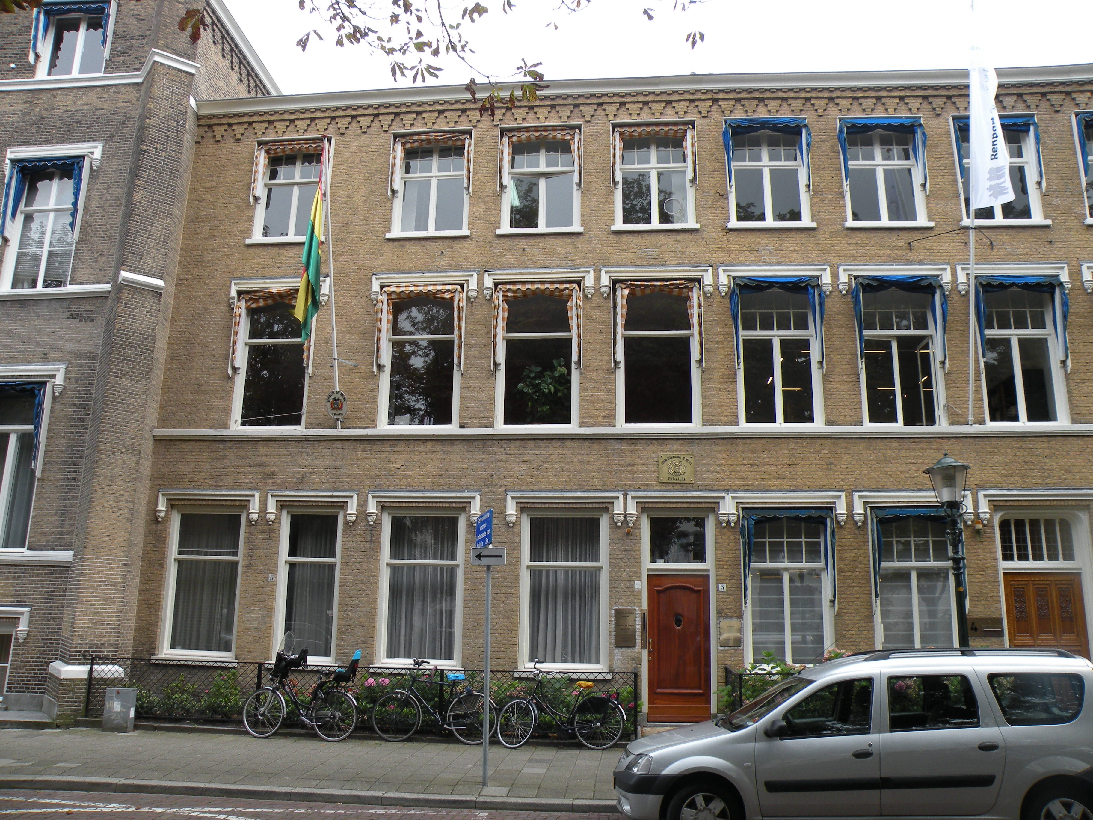 Den Haag - Nassaulaan 5 - Rijksmonument